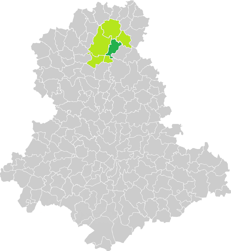 Carte de situation de la commune de Dompierre-les-Églises (en vert foncé) dans le votre Canton (en vert clair) sur une carte des communes de la Haute-Vienne